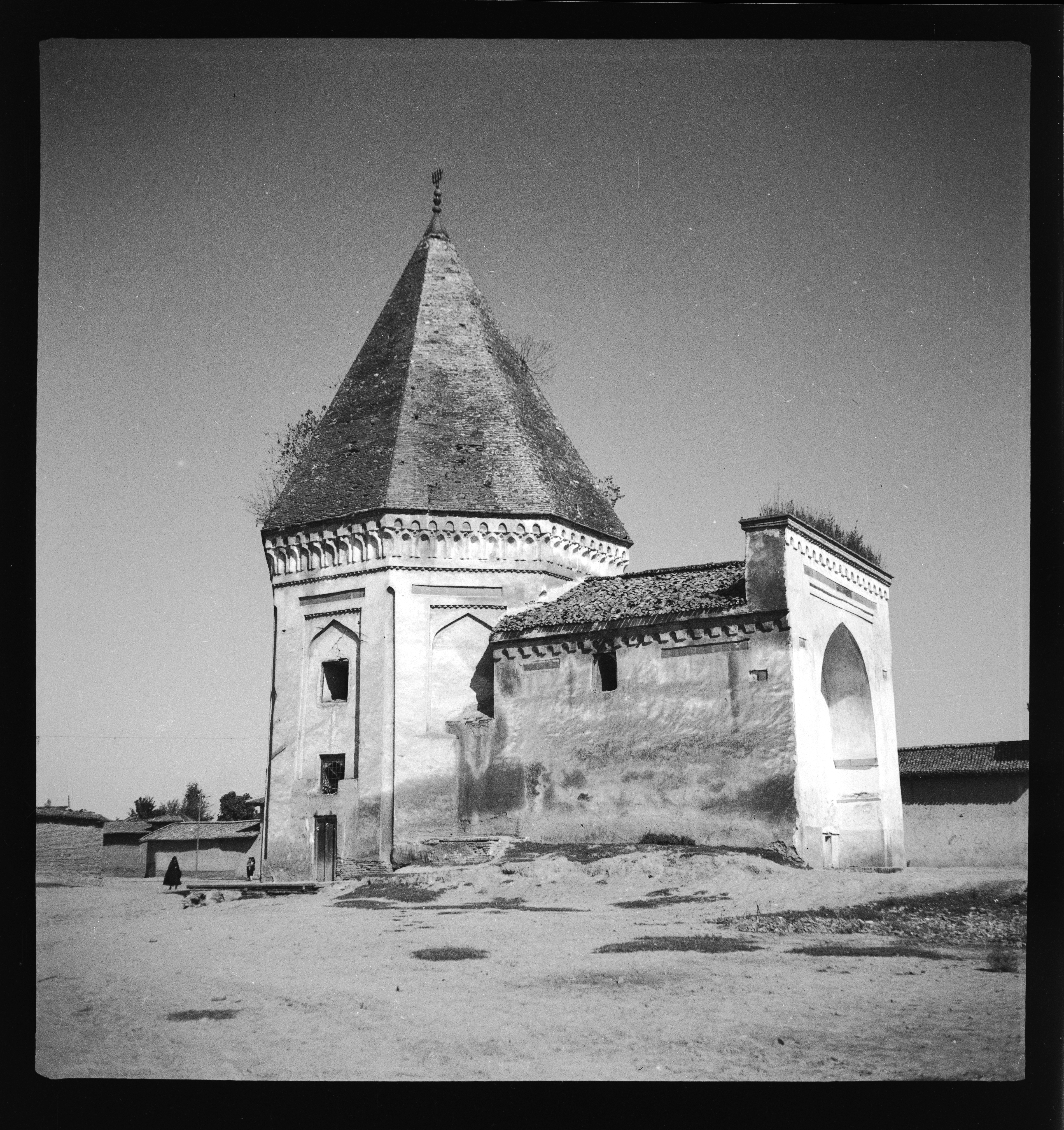 Persien, Babol: Gebäude; Madrasa